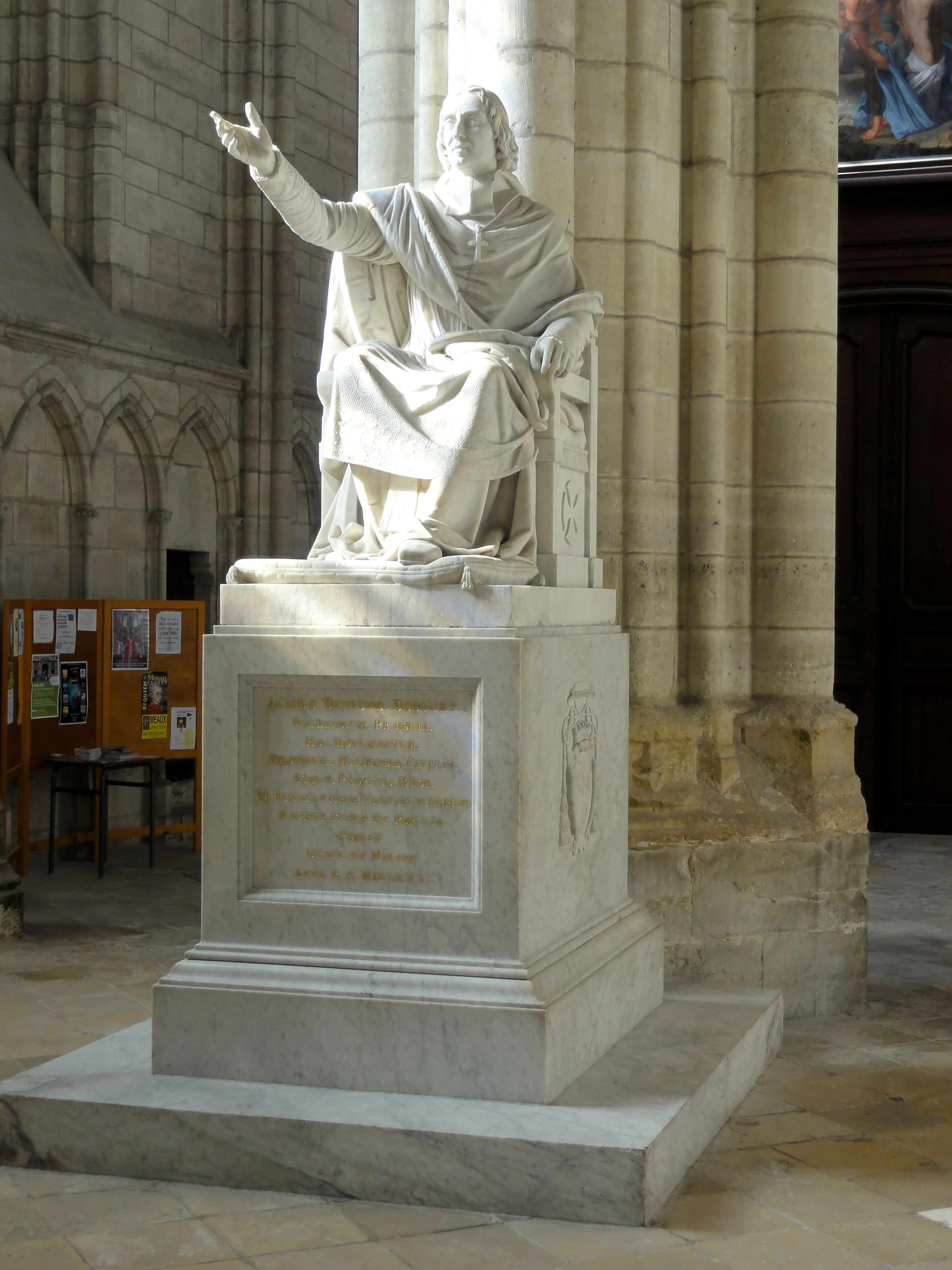 Monument commémoratif de Bossuet de 1820.